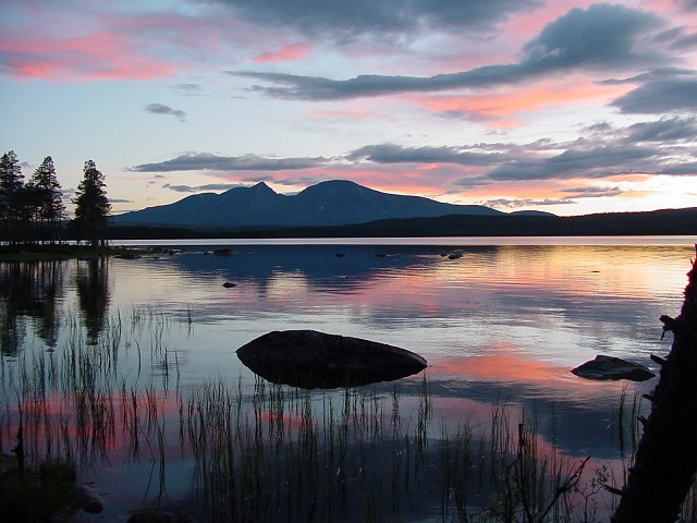 Utsikt fra Femunden, østre siden